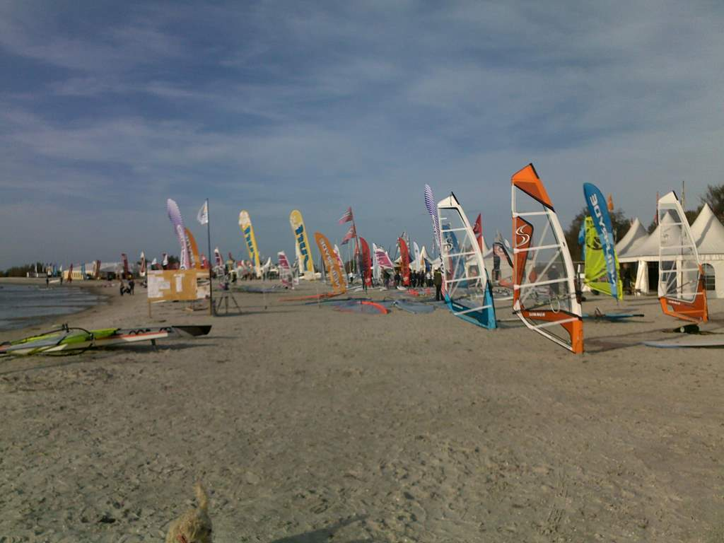 Windsurf Festival op strand bij Sotterum Chaletverhuur @ 'De Holle Poarte' in Friesland